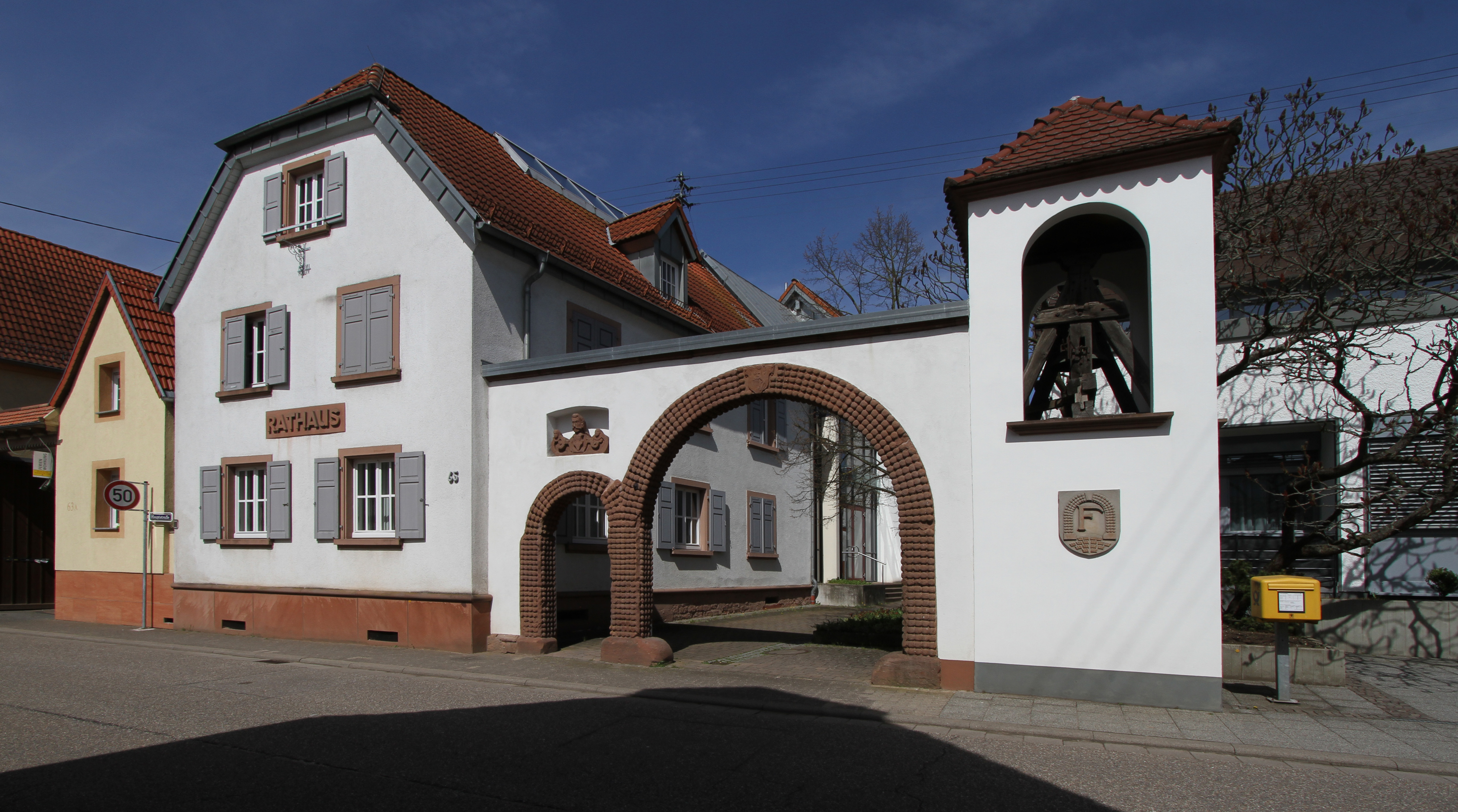 Freckenfeld